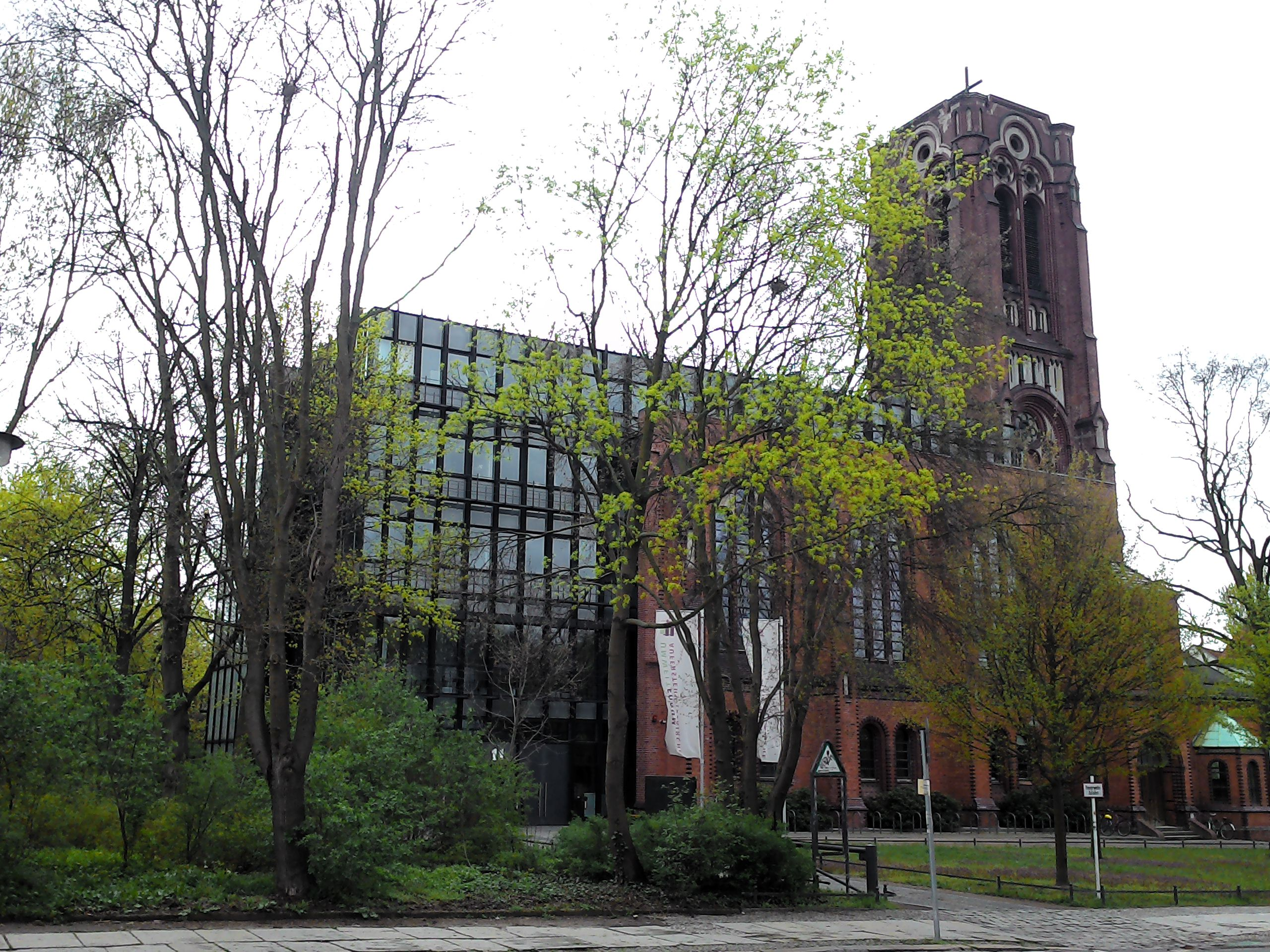 Auferstehungskirche in Berlin-Friedrichshain des Kirchenkreises Berlin Stadtmitte. Bau- und Kulturdenkmal mit modernem Einbau.